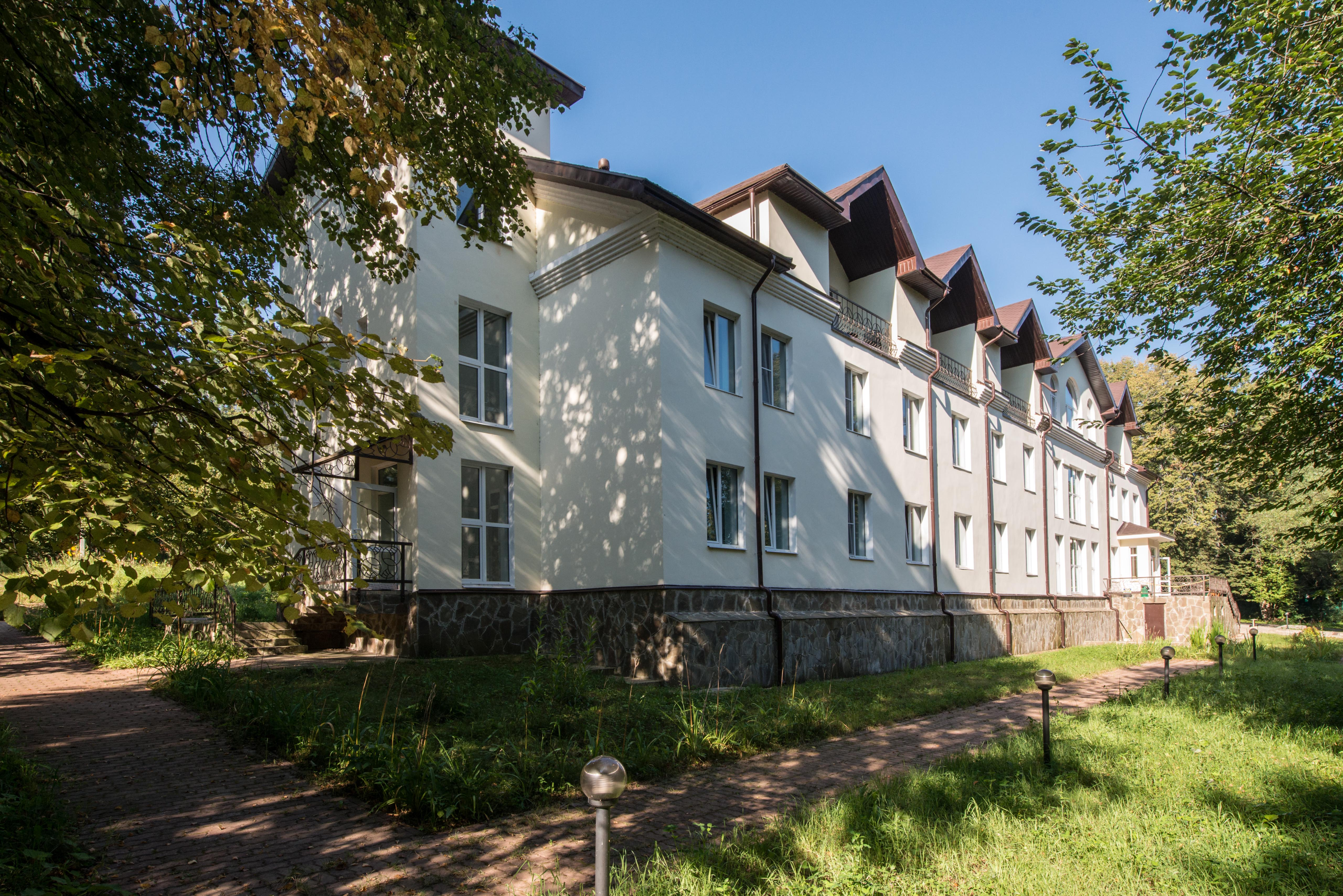 Корпус гостиницы дома отдыха "Серебряный век"